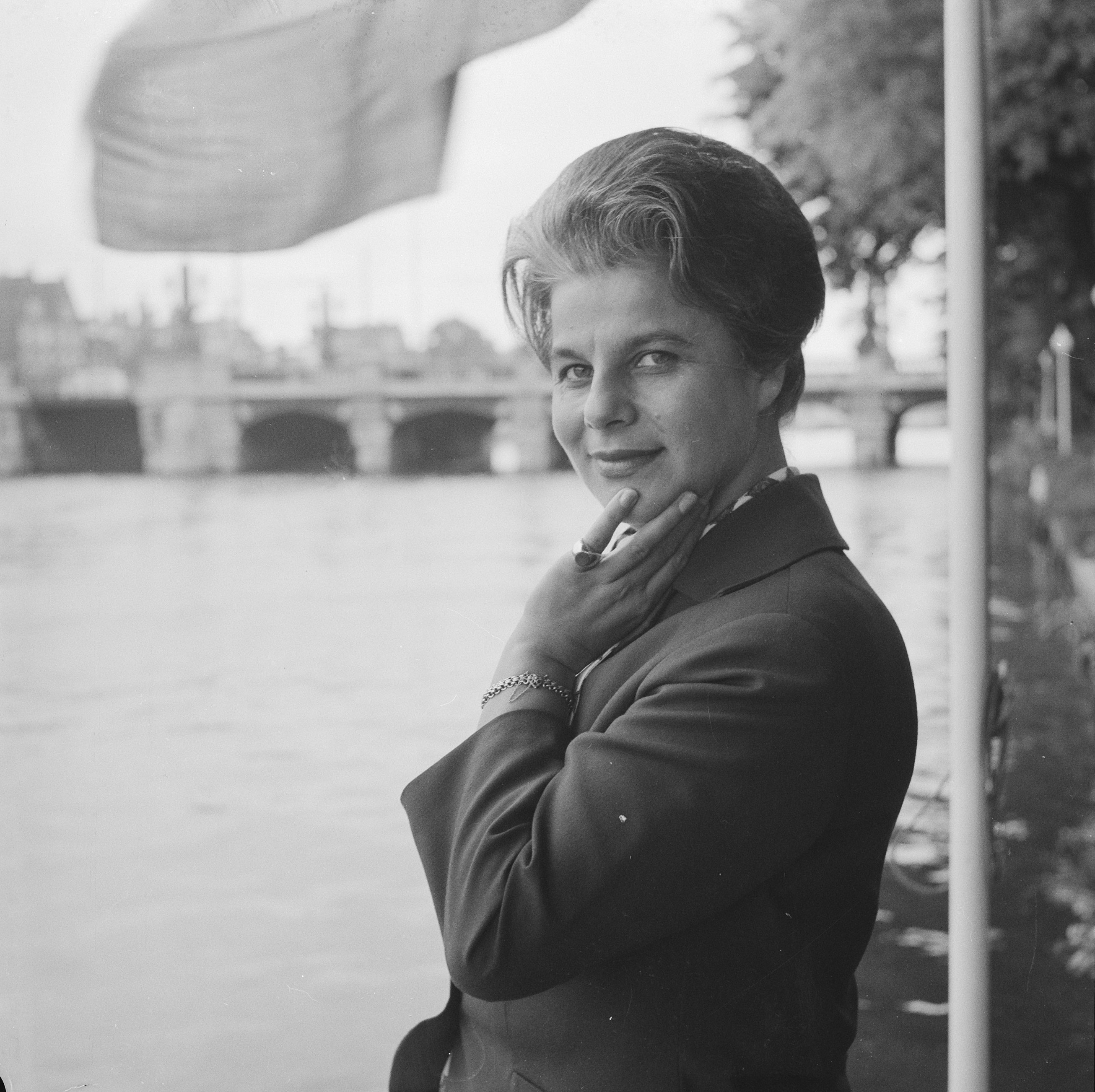 Collectie / Archief : Fotocollectie Anefo Reportage / Serie : [ onbekend ] Beschrijving : Portret van de sopraan Irmgard Seefried in Amsterdam vo deelnemen aan Holland-festival Datum : 21 juni 1962 Locatie : Amsterdam, Noord-Holland Trefwoorden : portretten, sopranen Persoonsnaam : Irmgard Seefried Instellingsnaam : Holland Festival Fotograaf : Nijs, Jac. de / Anefo Auteursrechthebbende : Nationaal Archief Materiaalsoort : Negatief (zwart/wit) Nummer archiefinventaris : bekijk toegang 2.24.01.03 Bestanddeelnummer : 914-0476